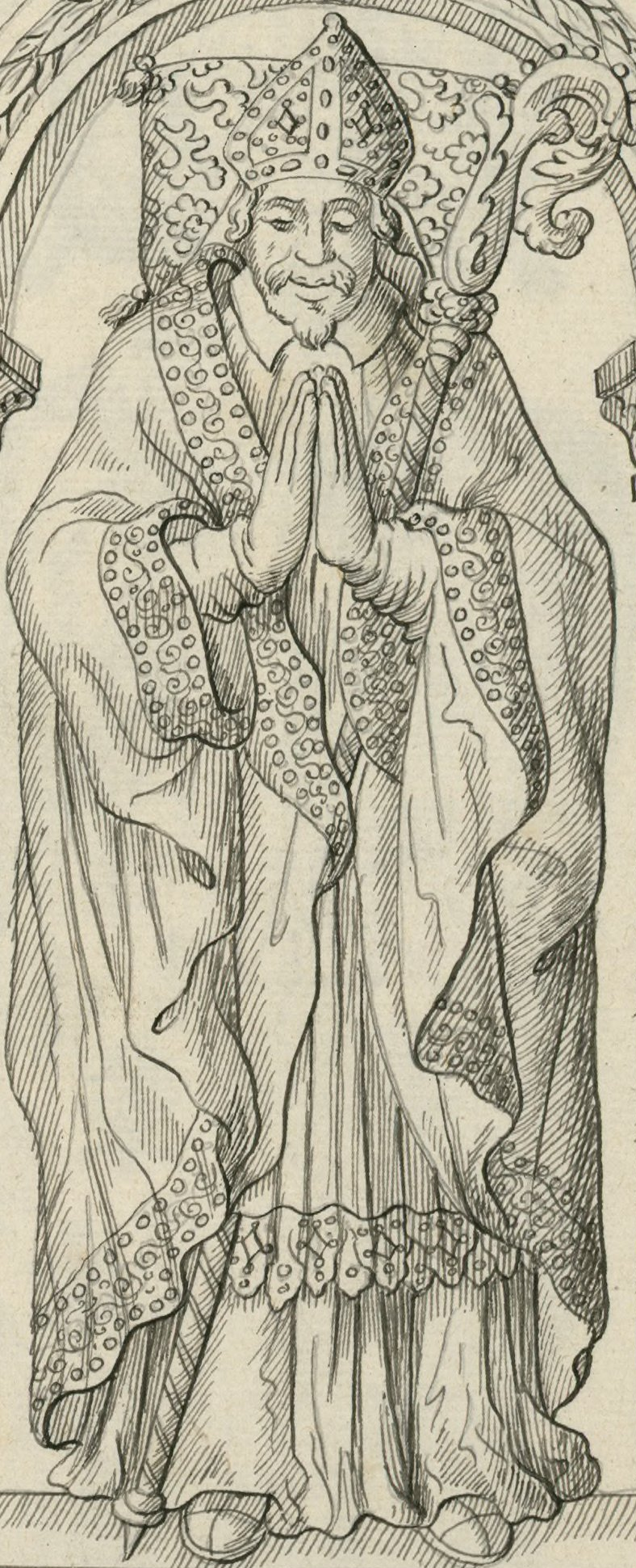 Pierre tombale sur laquelle est gravée l'effigie d'un prélat dans une bordure architectonique